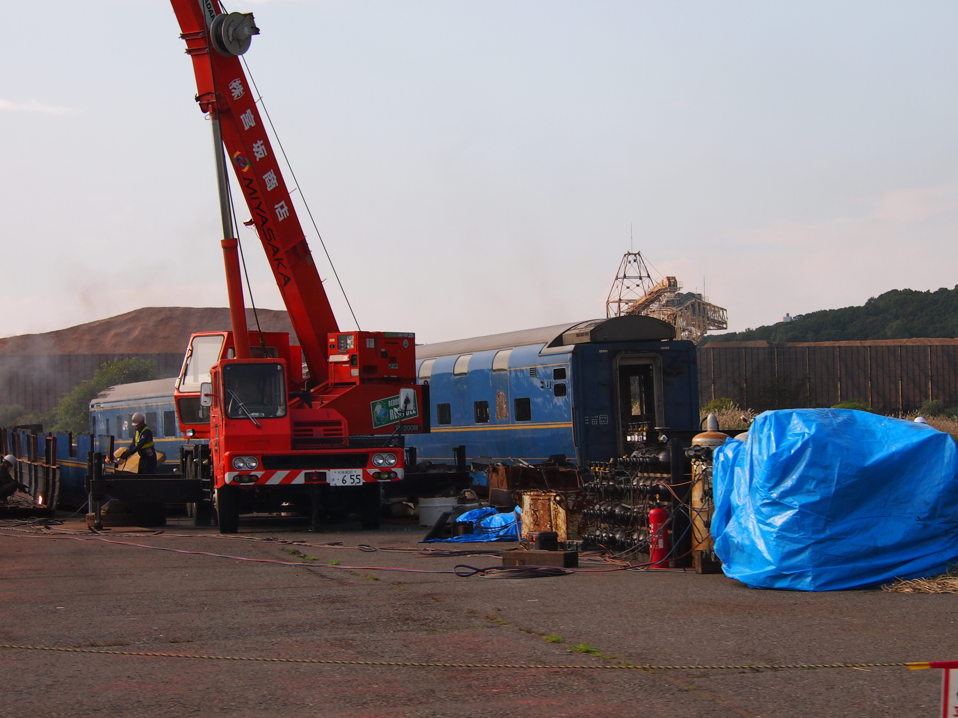 陣屋町駅臨港線で解体される２４系客車。